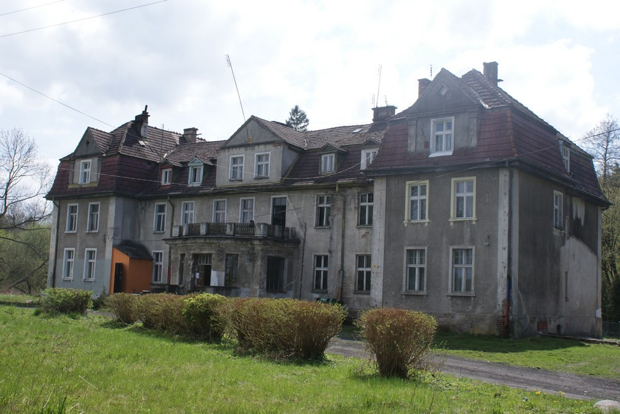 Pałac w Żytelkowie